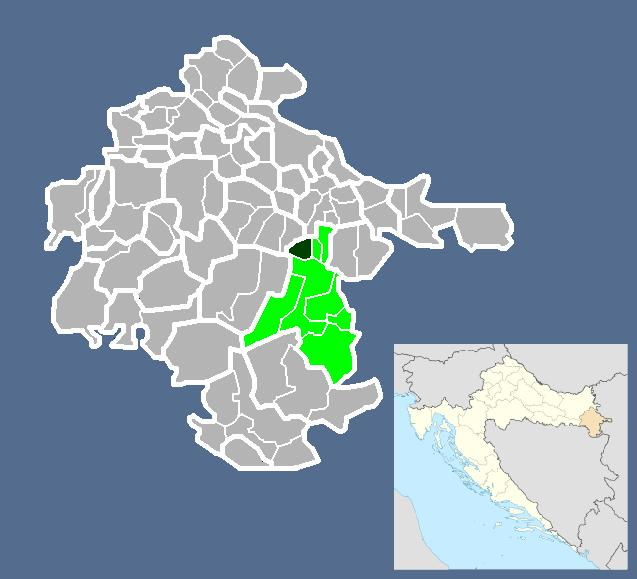 Српски (ћирилица): Насеље Ђелетовци у Општини Нијемци.